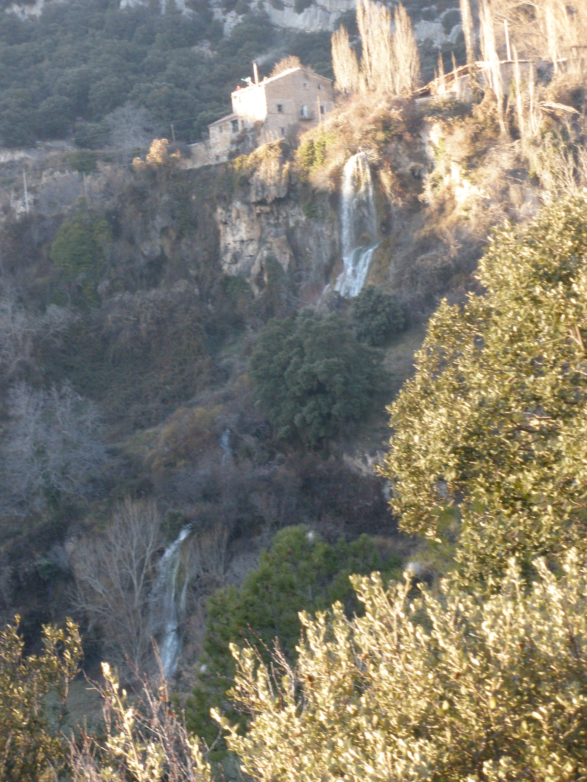 Riera de Cal Sala. Salts d'aigua que hi ha sota la masia de Cal Sala, a Cambrils de Solsonès, Municipi d'Odèn. Comarca del Solsonès. Foto presa des del camí que mena a l'església de Sant Quintí.